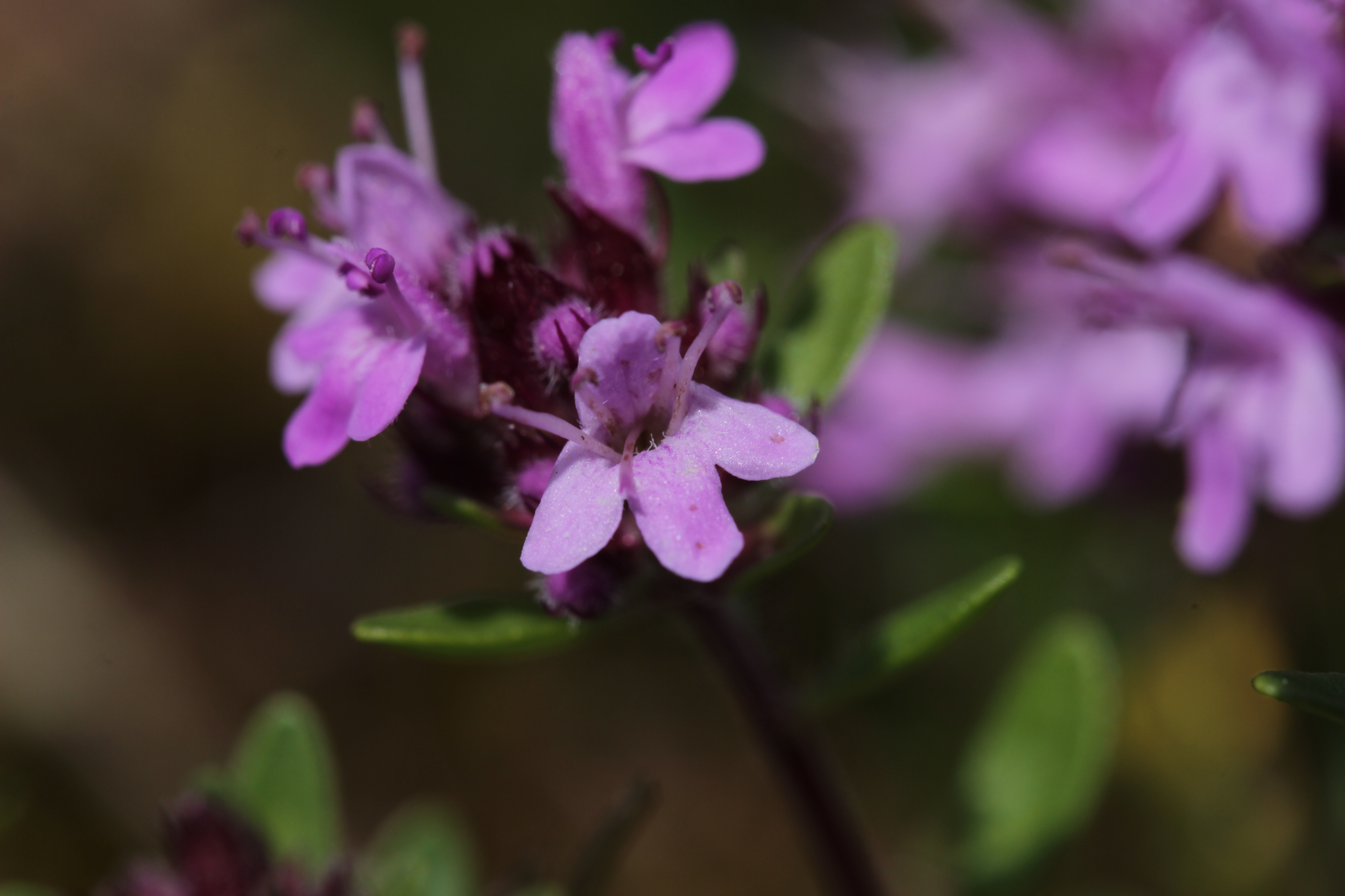 Thyme